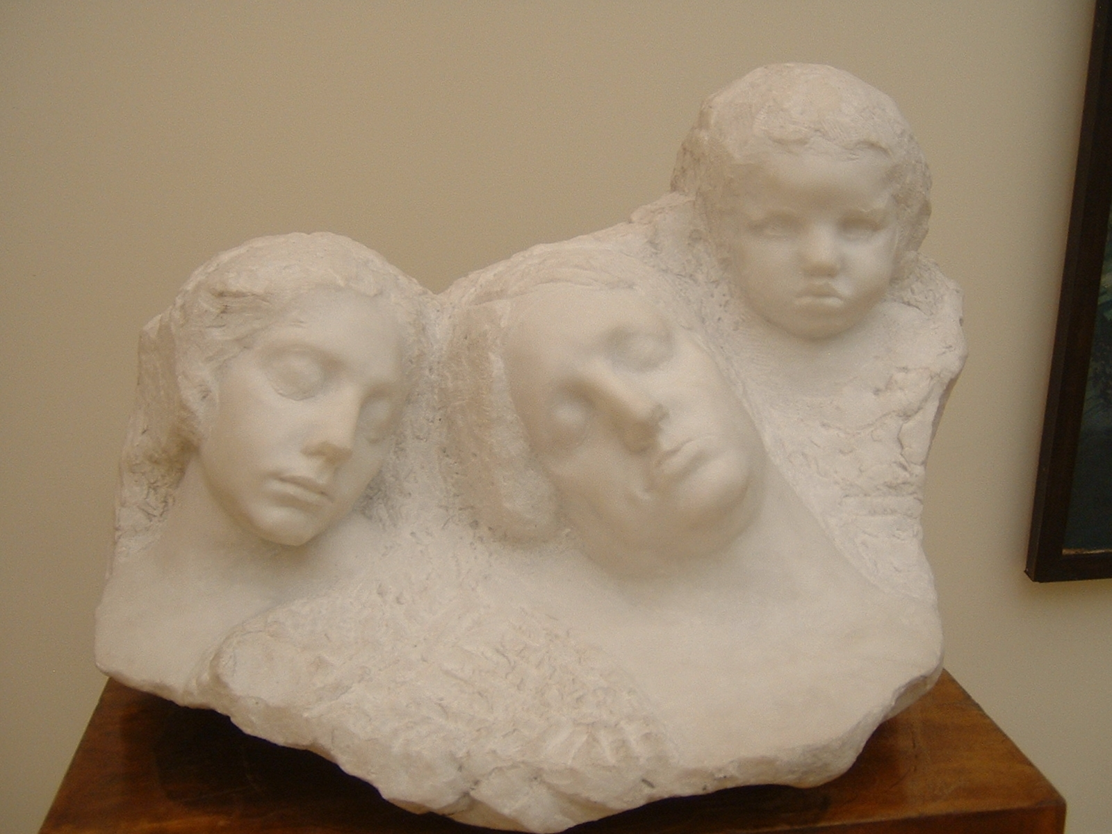 Anna Golubkina Sleepers (Спящие), 1912 The Russian Museum, Photo is mine